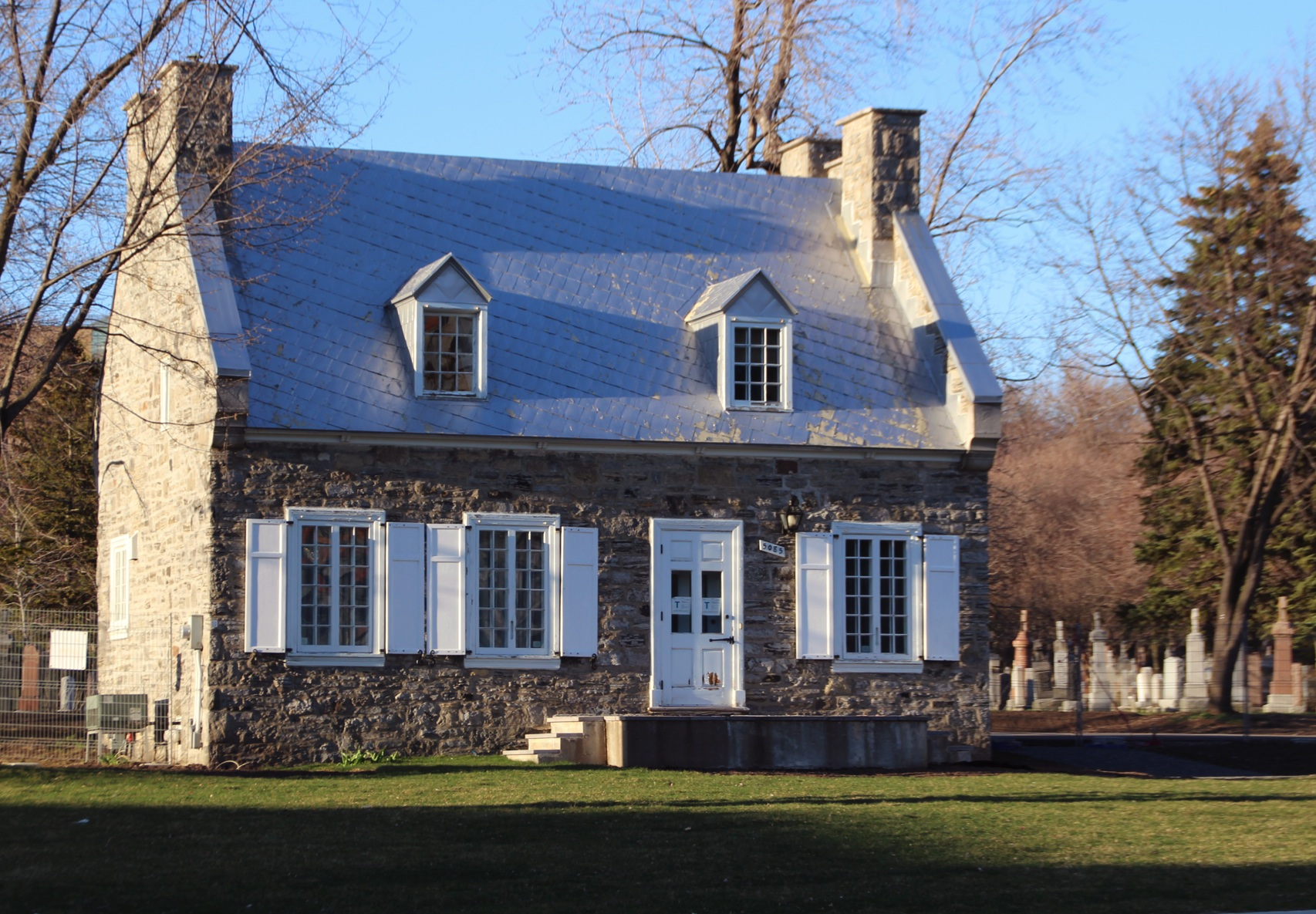 Maison Jarry-Dit-Henrichon sur l'avenue Decelles